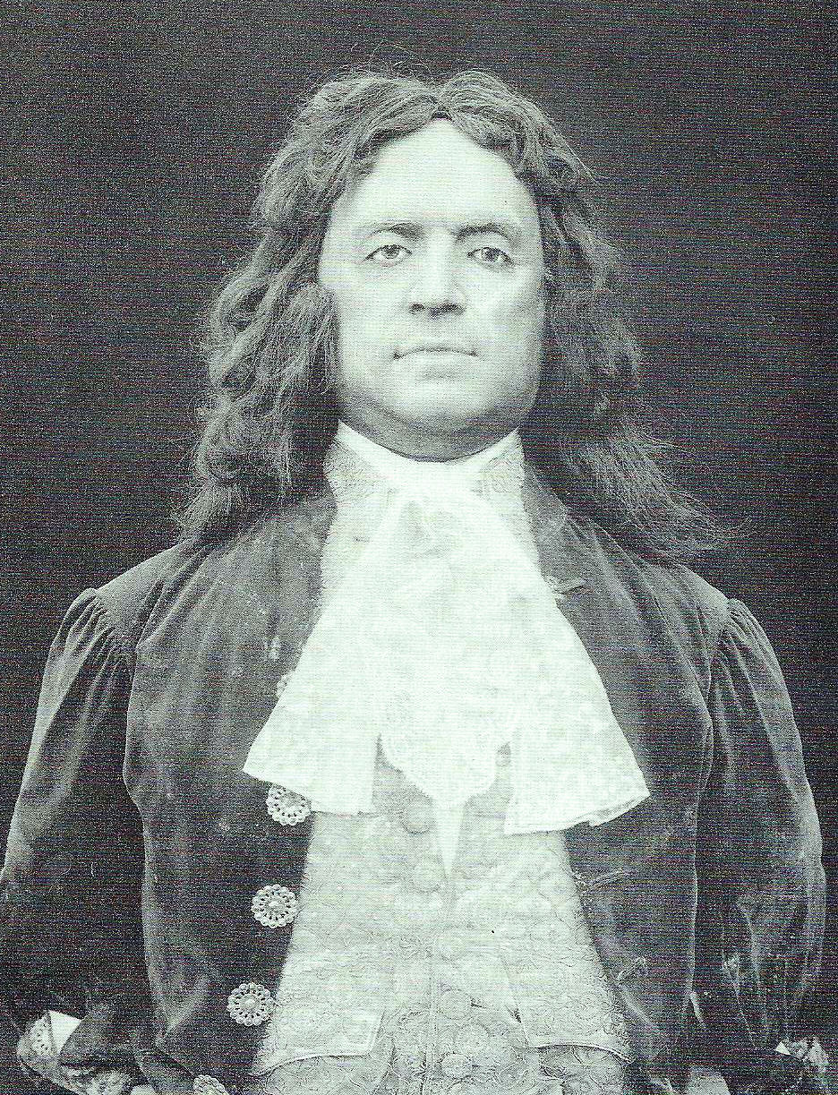 Porträtbüste des Gregor Wilhelm von Kirchner aus der Sakristei der Kirche St. Johann in Breitenfurt bei Wien